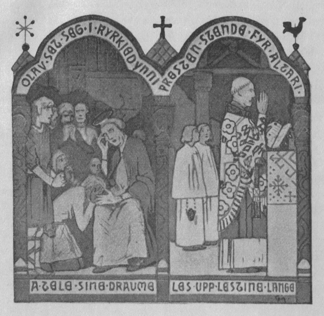 Presten for alteret og Olav i kirkedøren. Illustrasjon av Gerhard Munthe til Norsk forening for bogkunsts utgave av Draumkvæde, 1904.